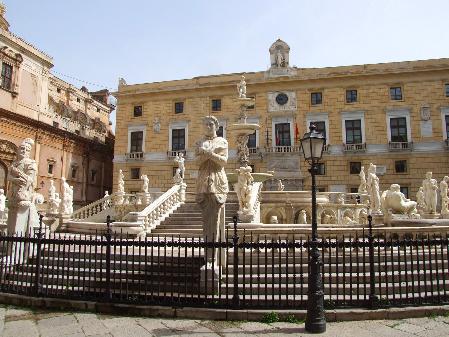 Palermo